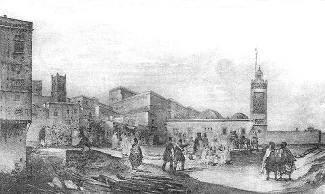 Mosquée Es Saida / Jamaa Es Saida en 1830 sur l'actuelle place des martyrs d'Alger - Casbah d'Alger.